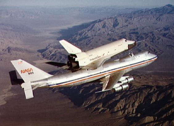 Space Shuttle Enterprise - NASA-foto dus publiek domein